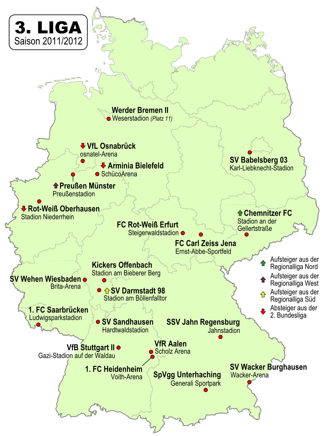 Karte der Vereine der 3. Fussball-Liga 2011/2012